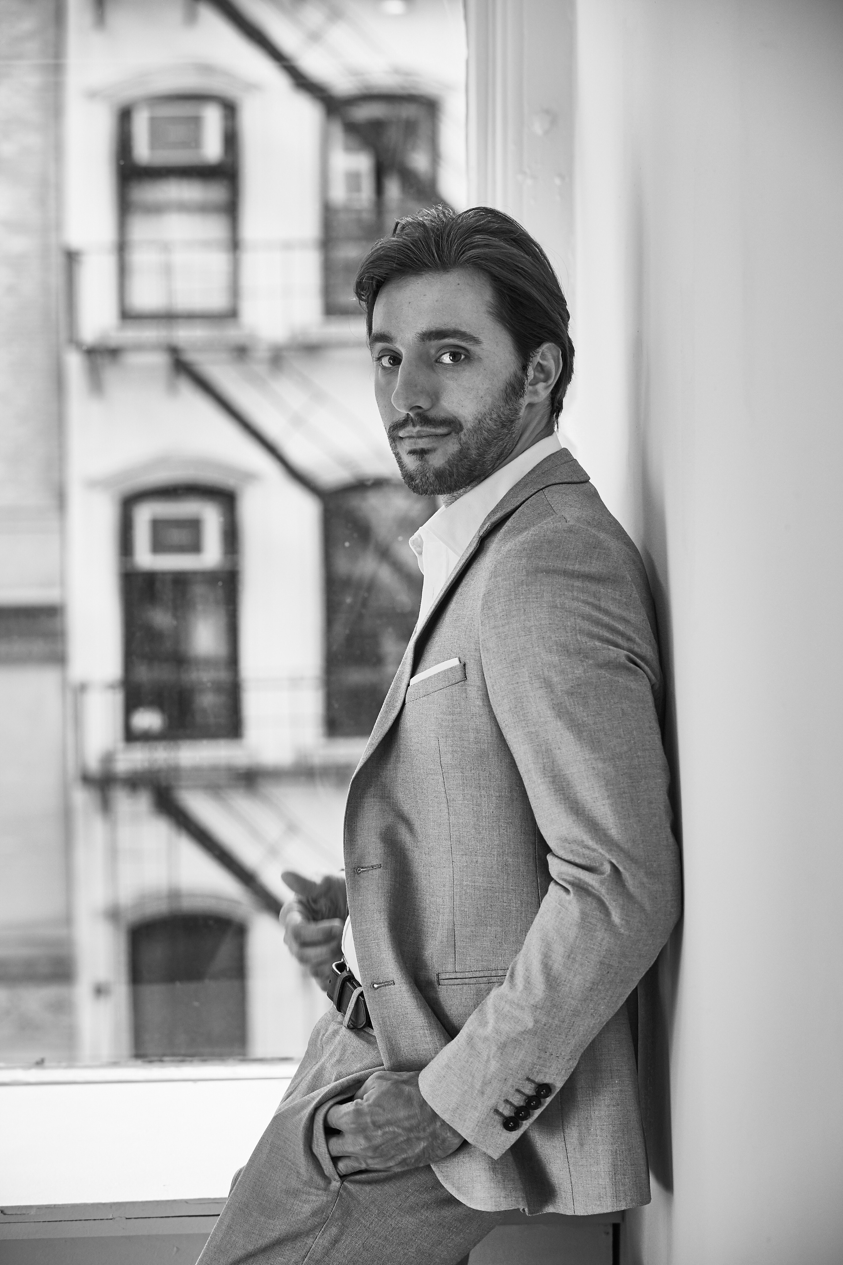 ator